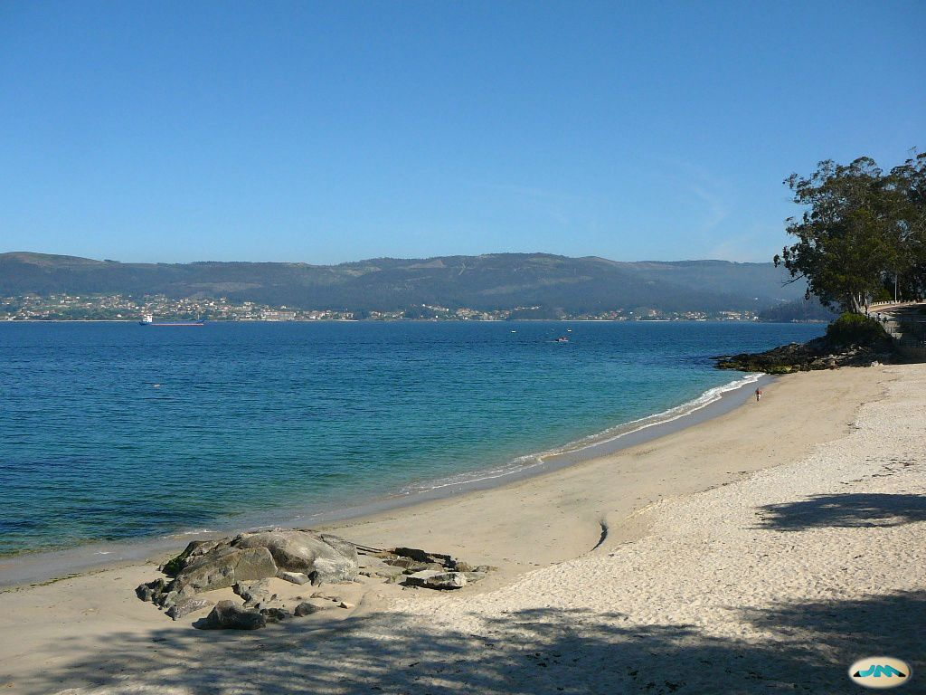 Marín-Portocelo13